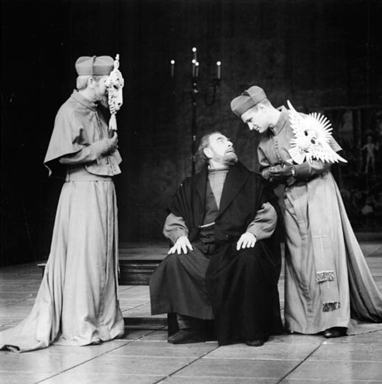 ADN-ZB Katschorowski 5.10.71 Berlin: Festtage-"Galilei" Im Berliner Ensemble hat Brechts dedeutendes Werk "Leben des Galileo Galilei" am 5.10.71 Premiere. Unter der Regie von Fritz Bennewitz a.G. spielt Wolfgang Heinz (Mitte) die Titelrolle, Ekkehard Schall (r.) und Dieter Knaup (l.) stellen Kardinäle dar.